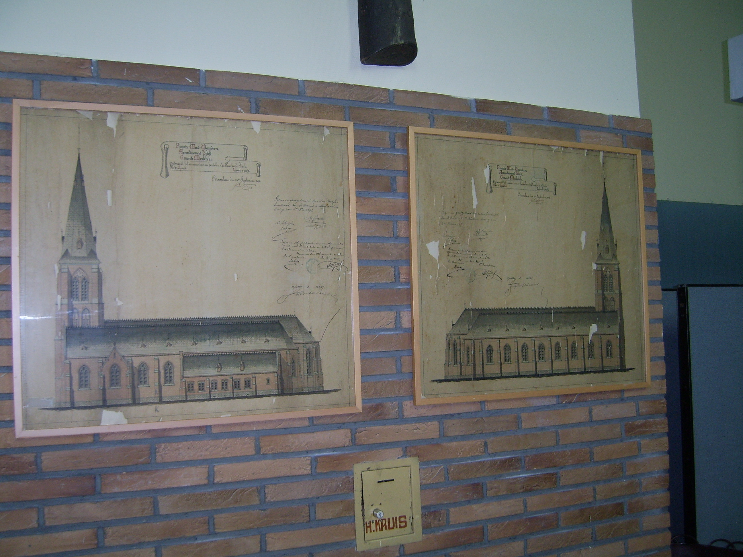 Originele bouwschetsen van de Sint-Amanduskerk te Meulebeke